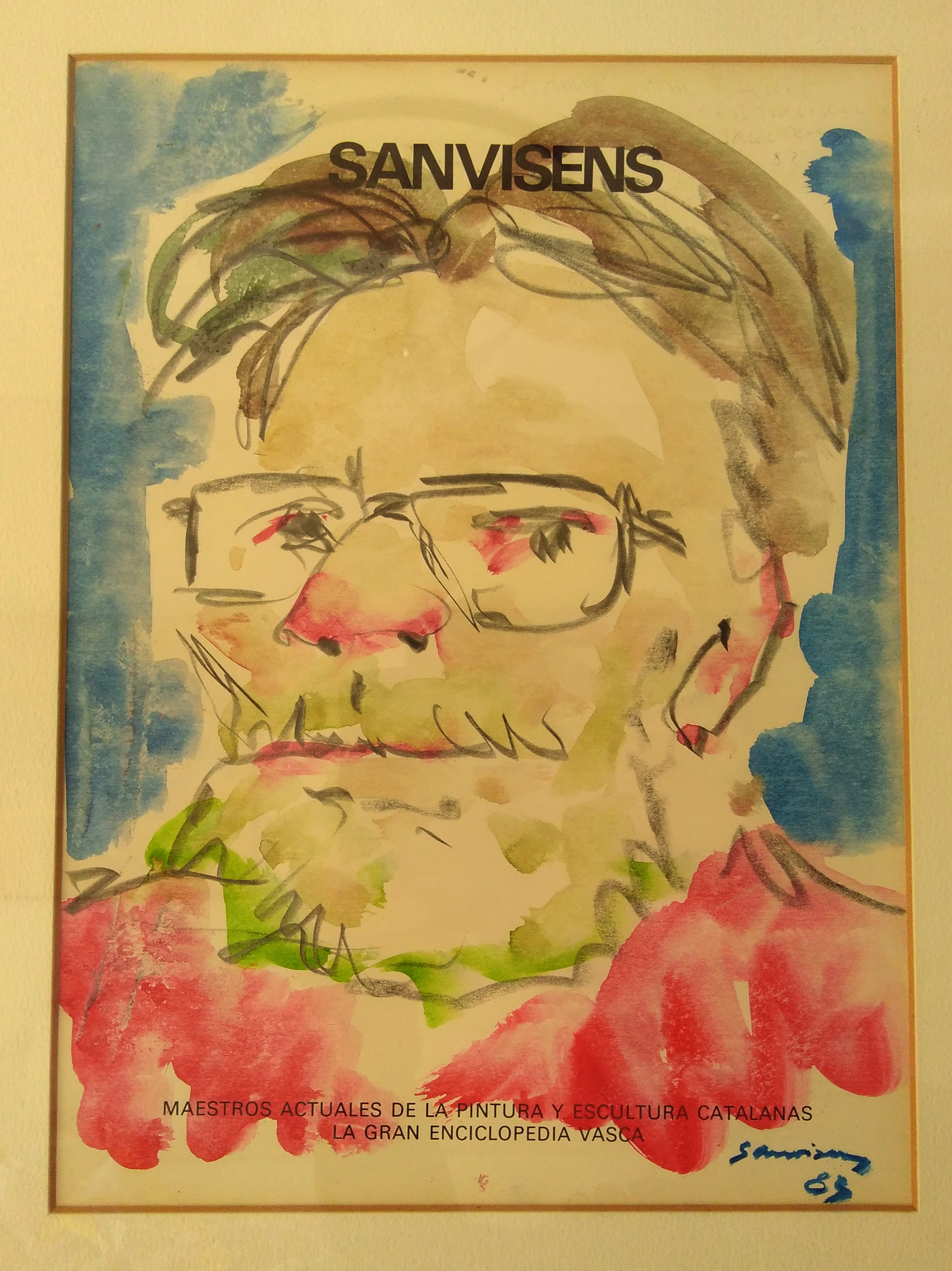 El pintor Ramon Sanvisens. Esbós d'autorretrar, 1983